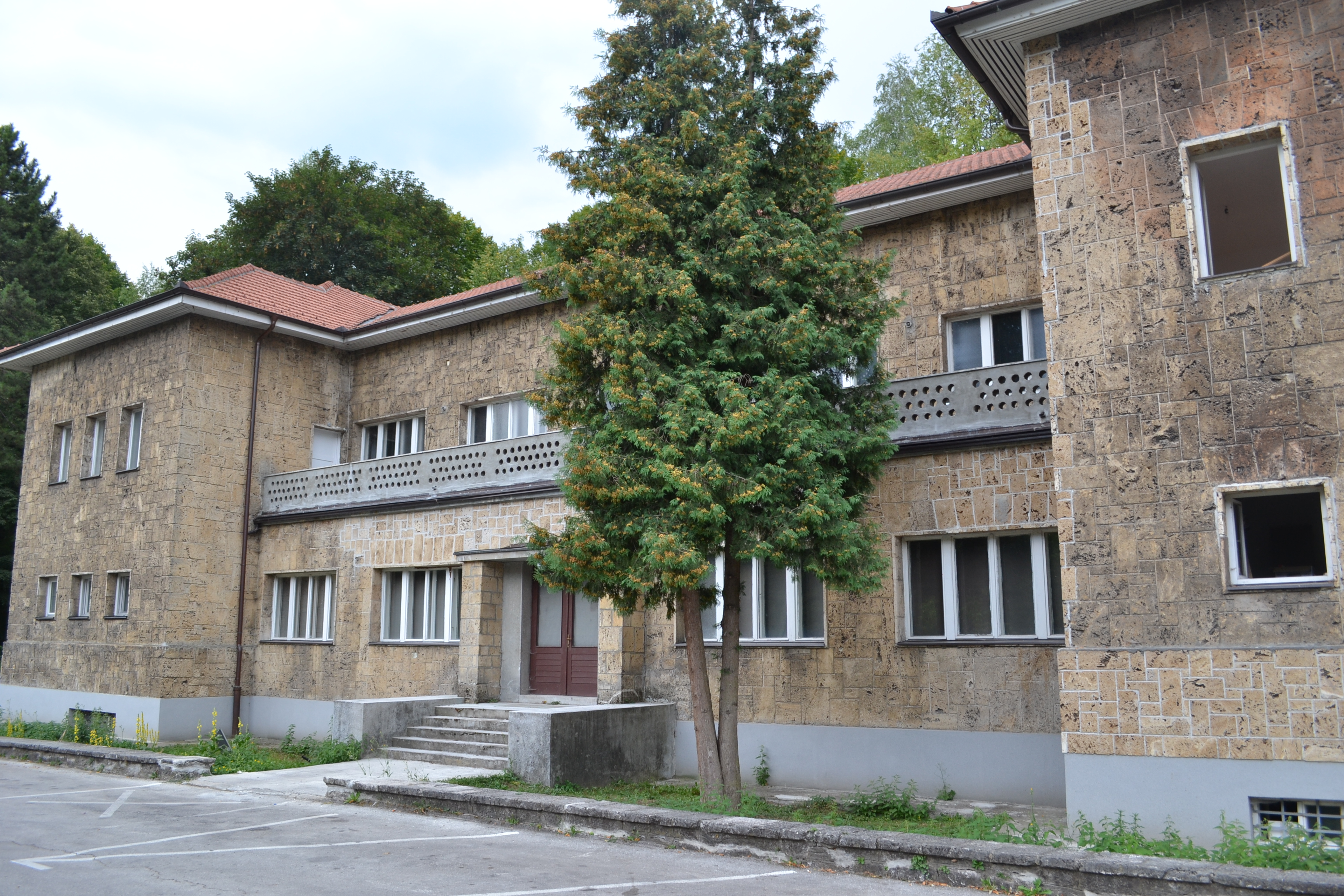 Muzej AVNOJ-a u Jajcu